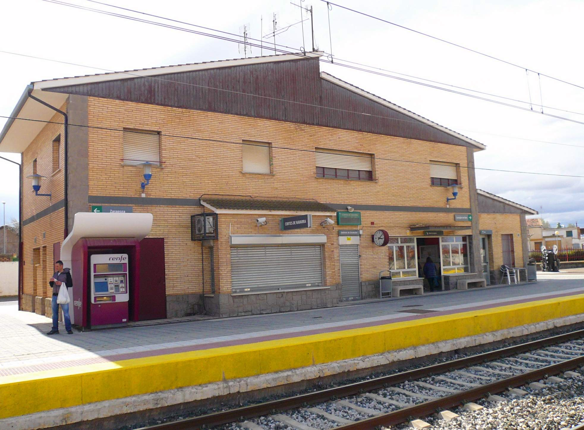 Estación de Cortes de Navarra